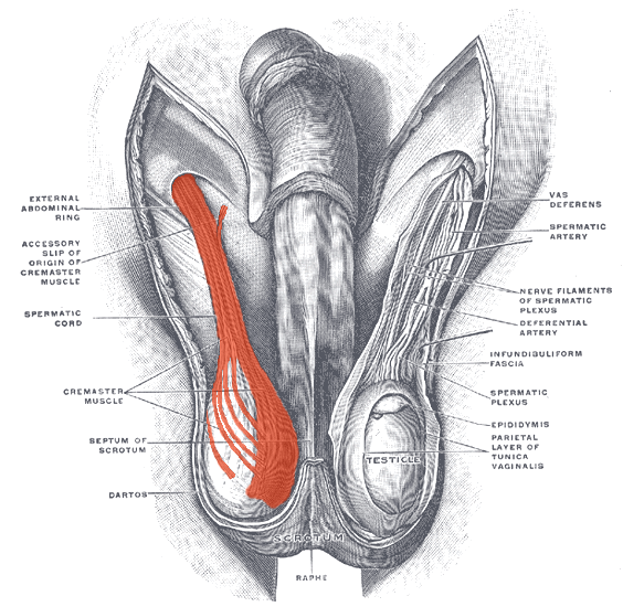 Musculus cremaster